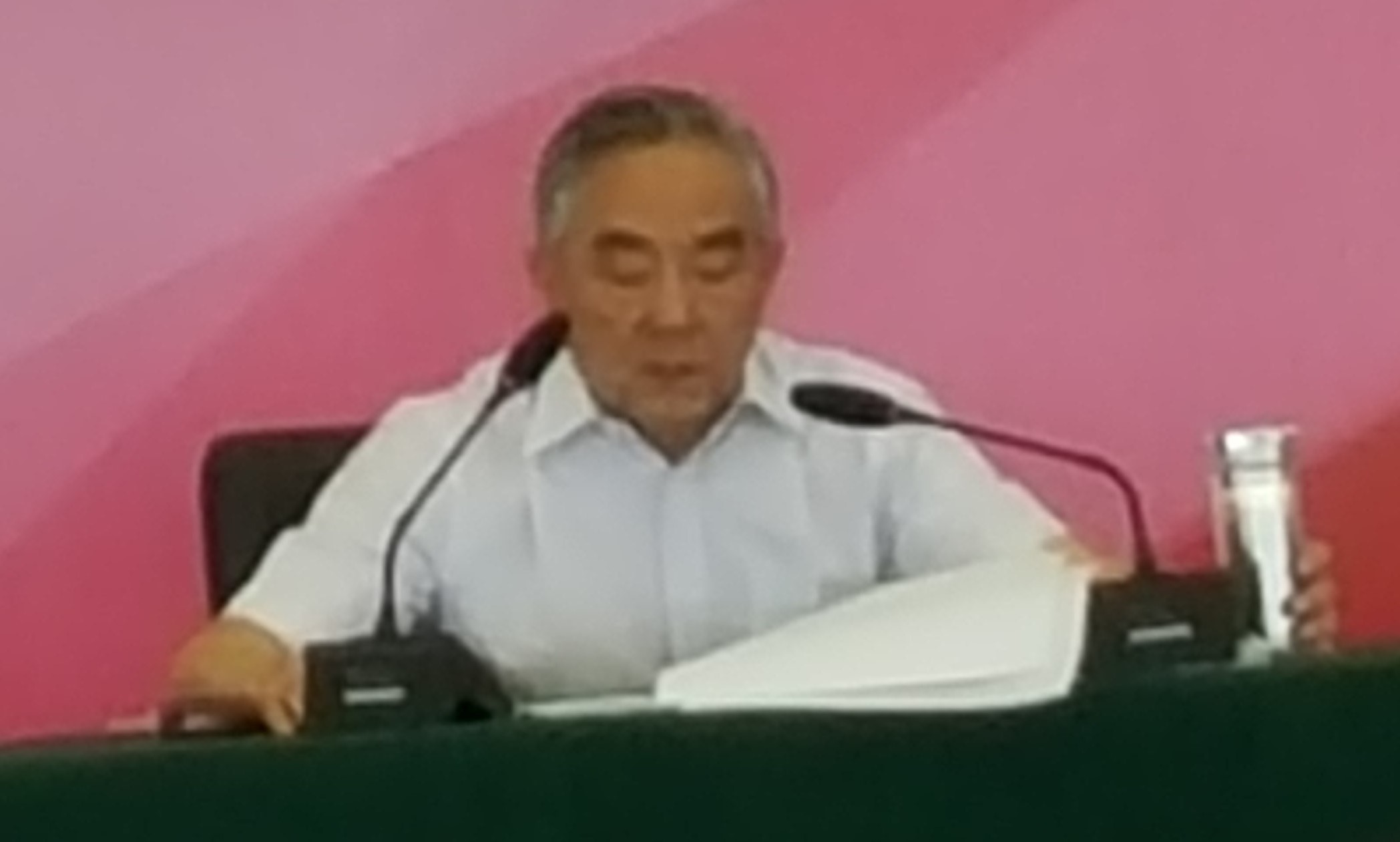 中文（中国大陆）: 杨凯生在北京大学经济学院